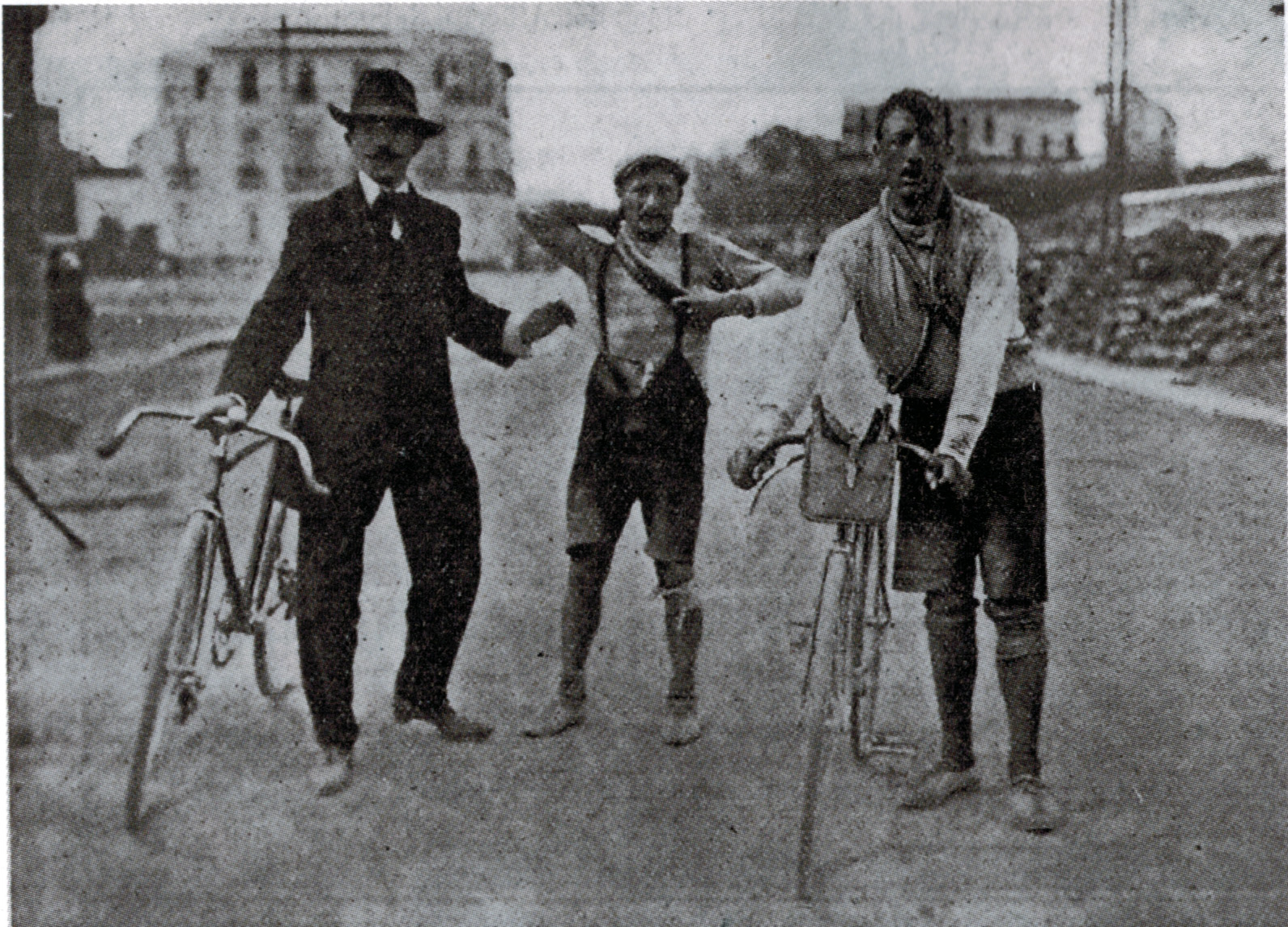 Immagine del Giro di Sicilia del 1907 con i due primi classificati.